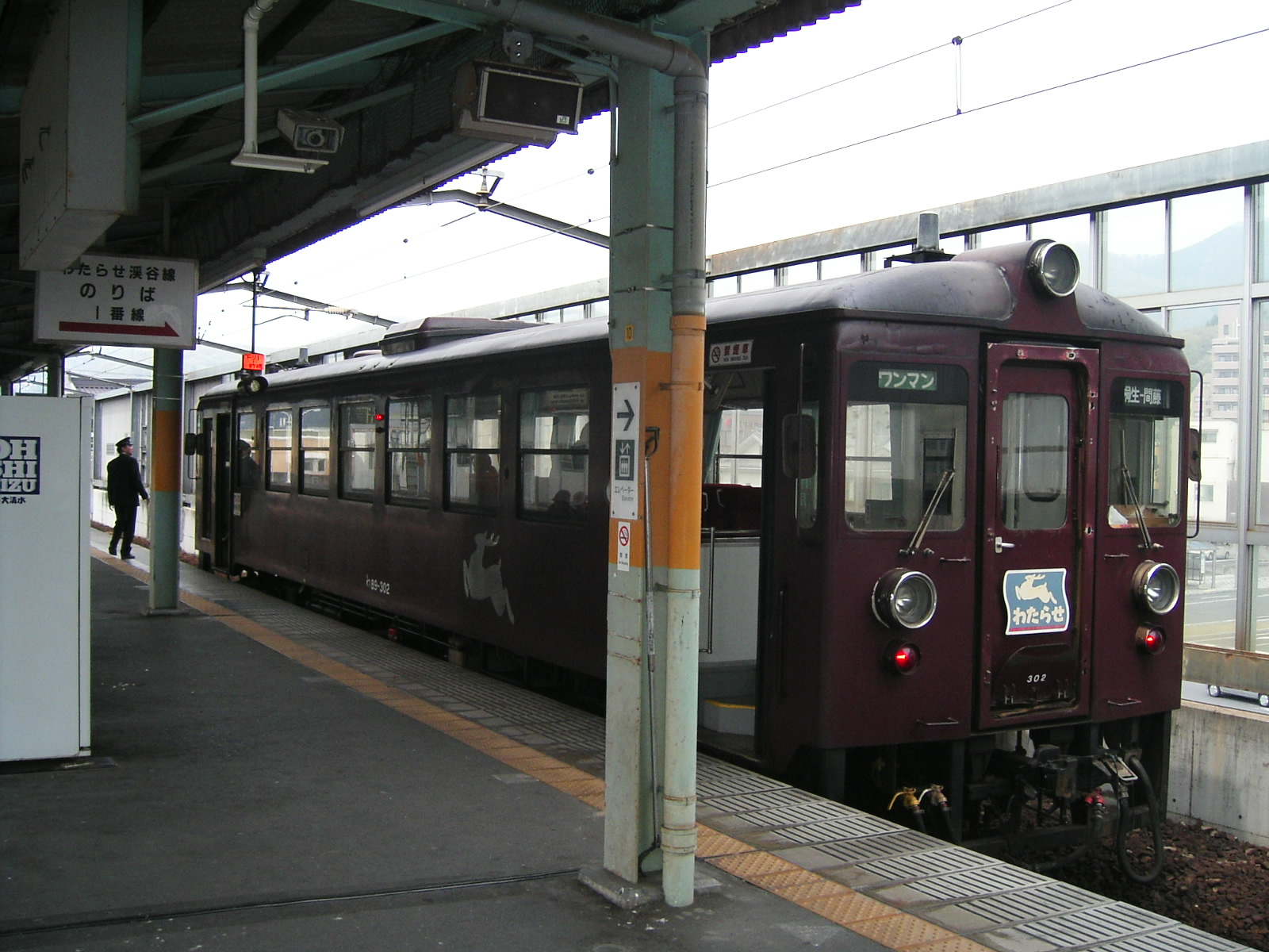 Watarase Keikoku Tetsudo at Kiryu station(Ryomo Line) in Gunma pref,Japan 桐生駅（わたらせ渓谷鐵道）